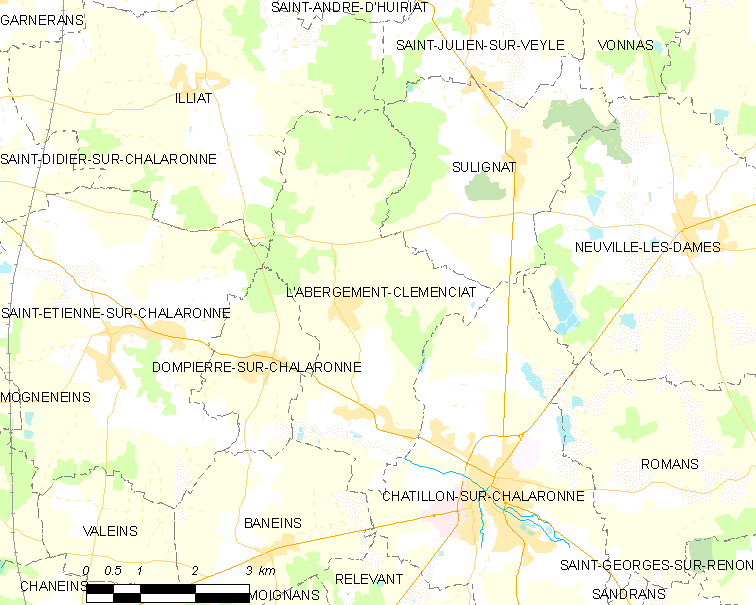 commune française: L'Abergement-Clémenciat Map commune FR insee code 01001.png